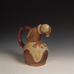 El cóndor en la cerámica Mochica. Museo Larco.